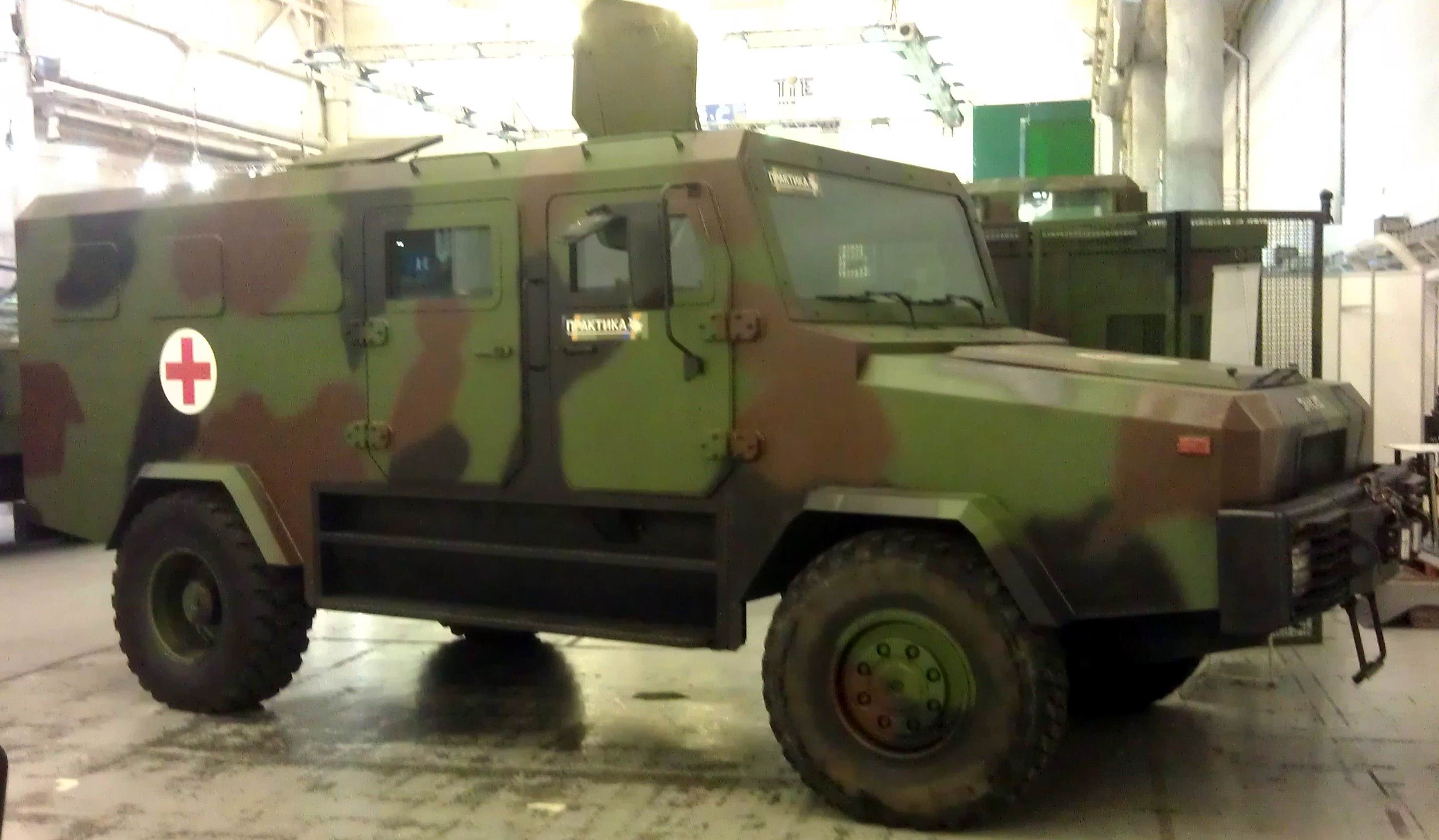 "Козак-2014" - предсерийный прототип ББМ "Козак-2". Санитарная версия машины. Выставка "Зброя та безпека", Киев, сентябрь 2015 г.